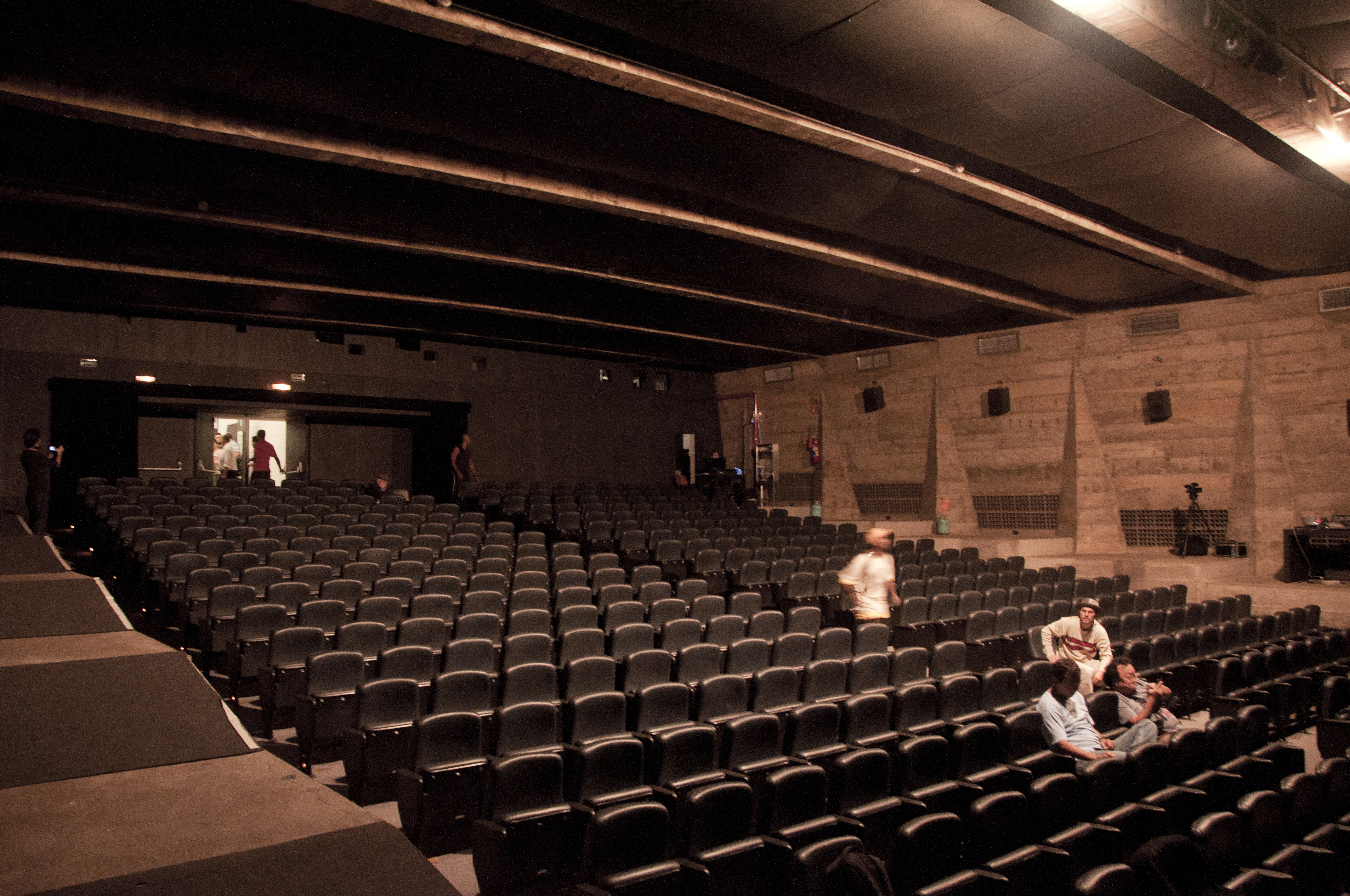 Show do Treme Terra no MASP